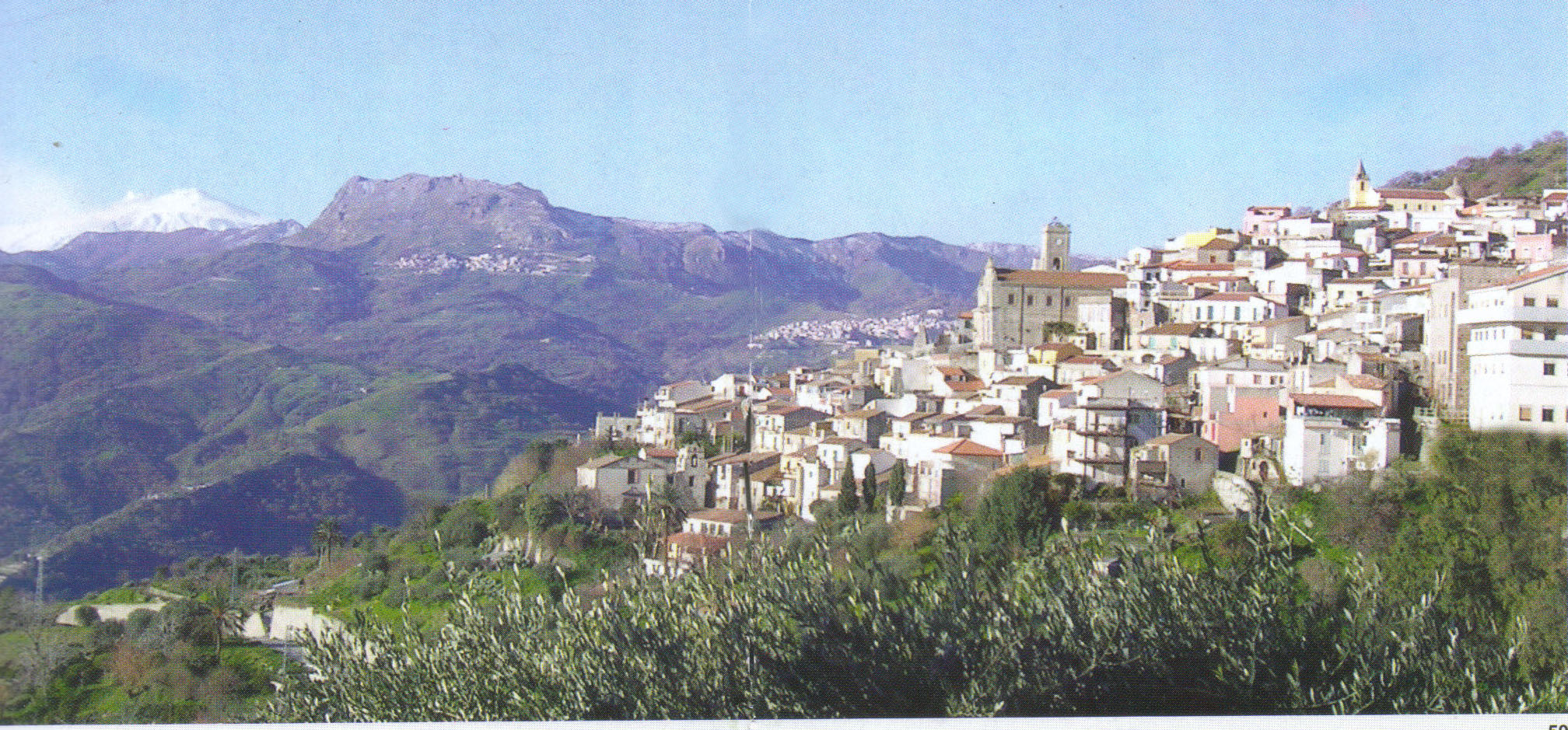 Panorama con vista del vulcano Etna